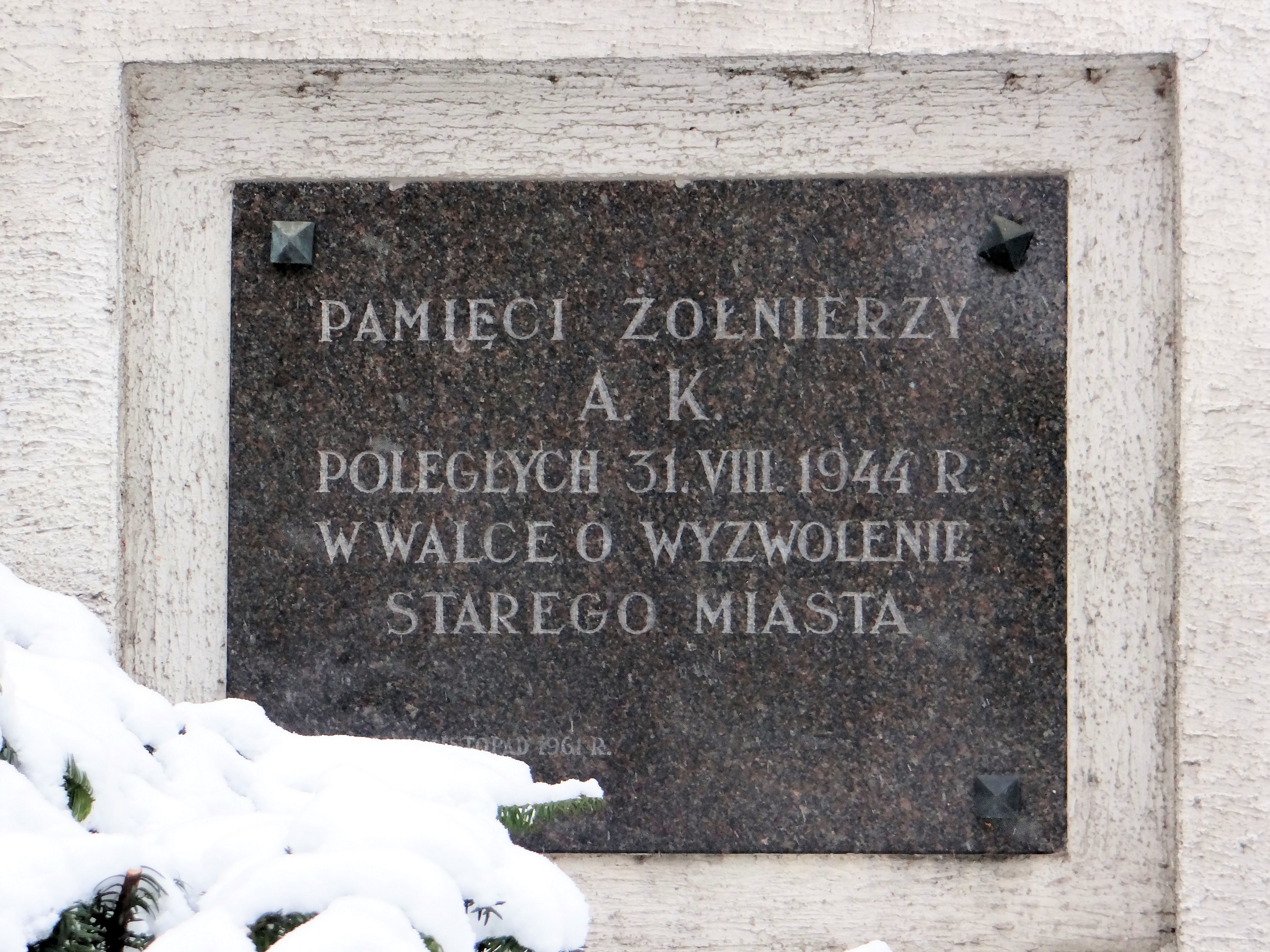 Miejsce Pamięci Narodowej poświęcone żołnierzom Armii Krajowej poległym 31 sierpnia 1944 r w warce o wyzwolenie Starego Miasta (Warszawa, ul. Bielańska 3)